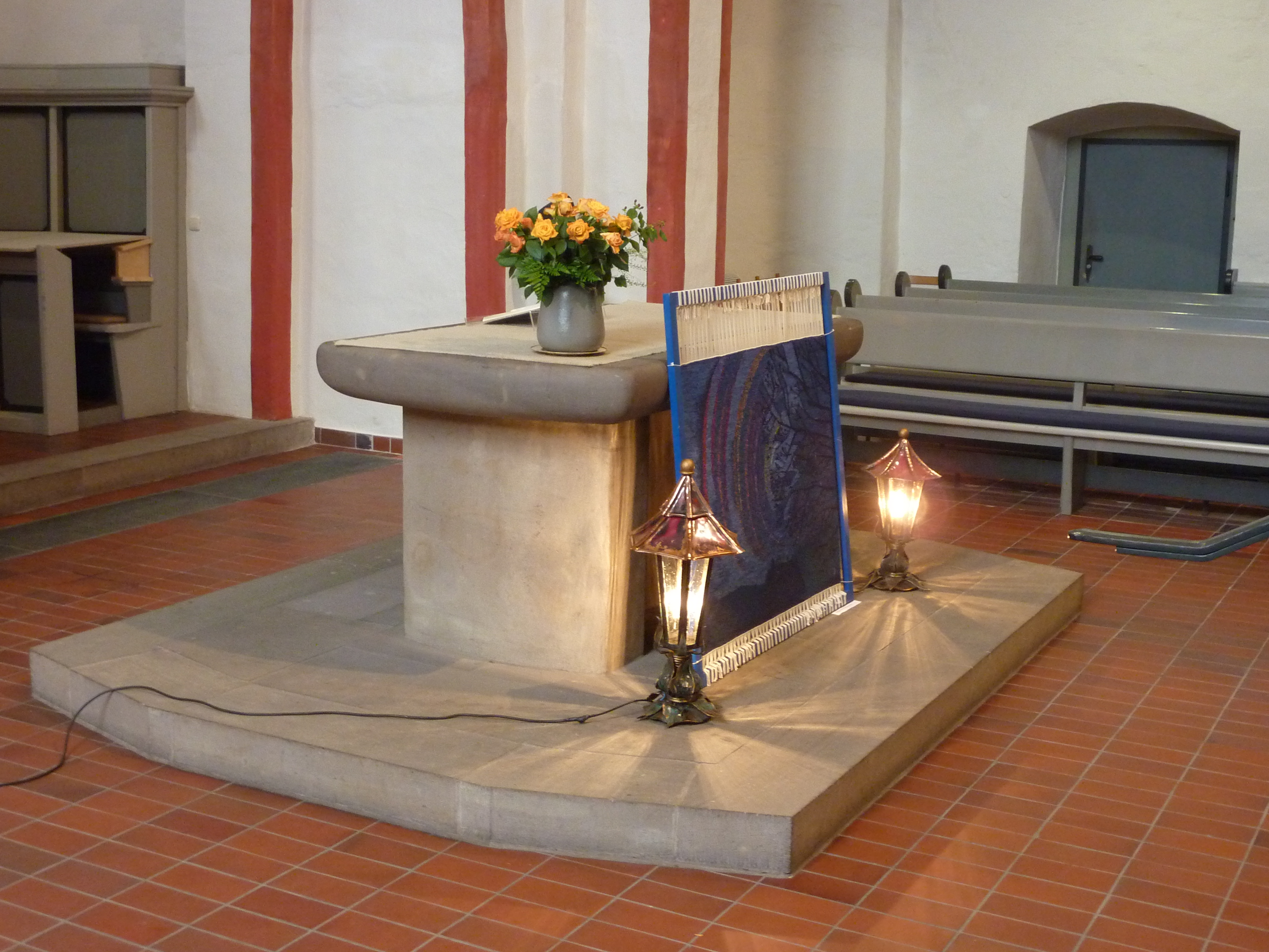 Evangelische Nikolaikirche in Siegen/Westfalen: Altar, gesehen aus dem Seitenschiff.